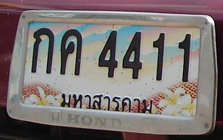 หนึ่งในหลายป้ายทะเบียนเลขสวย ที่มีการประมูล จาก จ. มหาสารคาม (auctioned plate from Maha Sarakham, Thailand) (ไม่ใช่ป้ายของข้าพเจ้า - ไม่ทราบเจ้าของ - This is not my plates.) The auction plates/numbers ("Super Number") are movable to an another car. And it was moved.